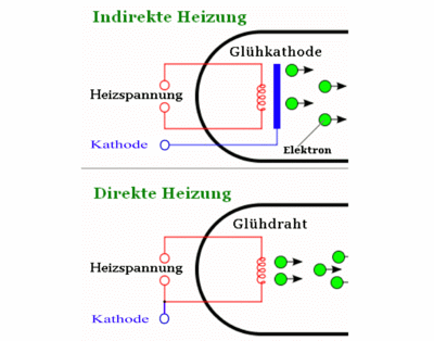 Indirekte und direkte (Be-)Heizung von Elektronenröhren.